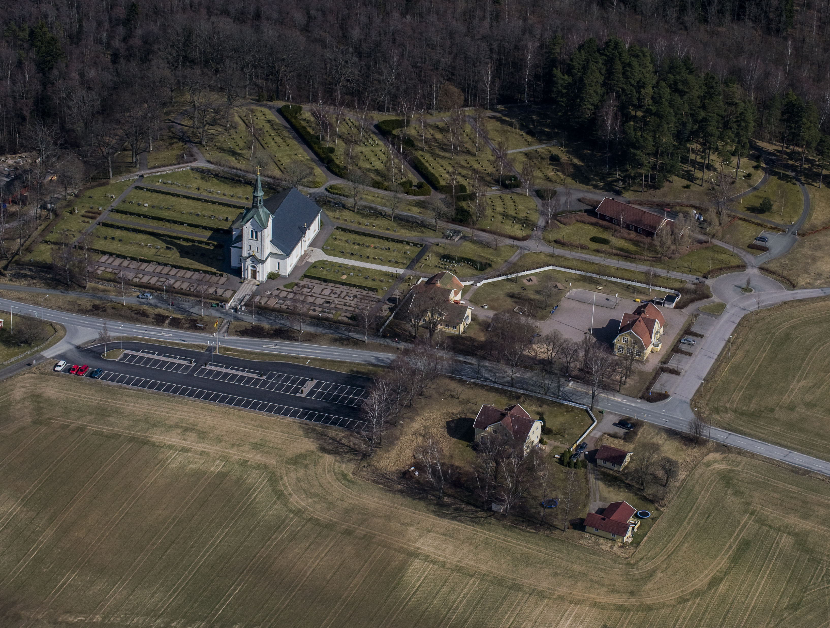 Bankeryds kyrka från luften